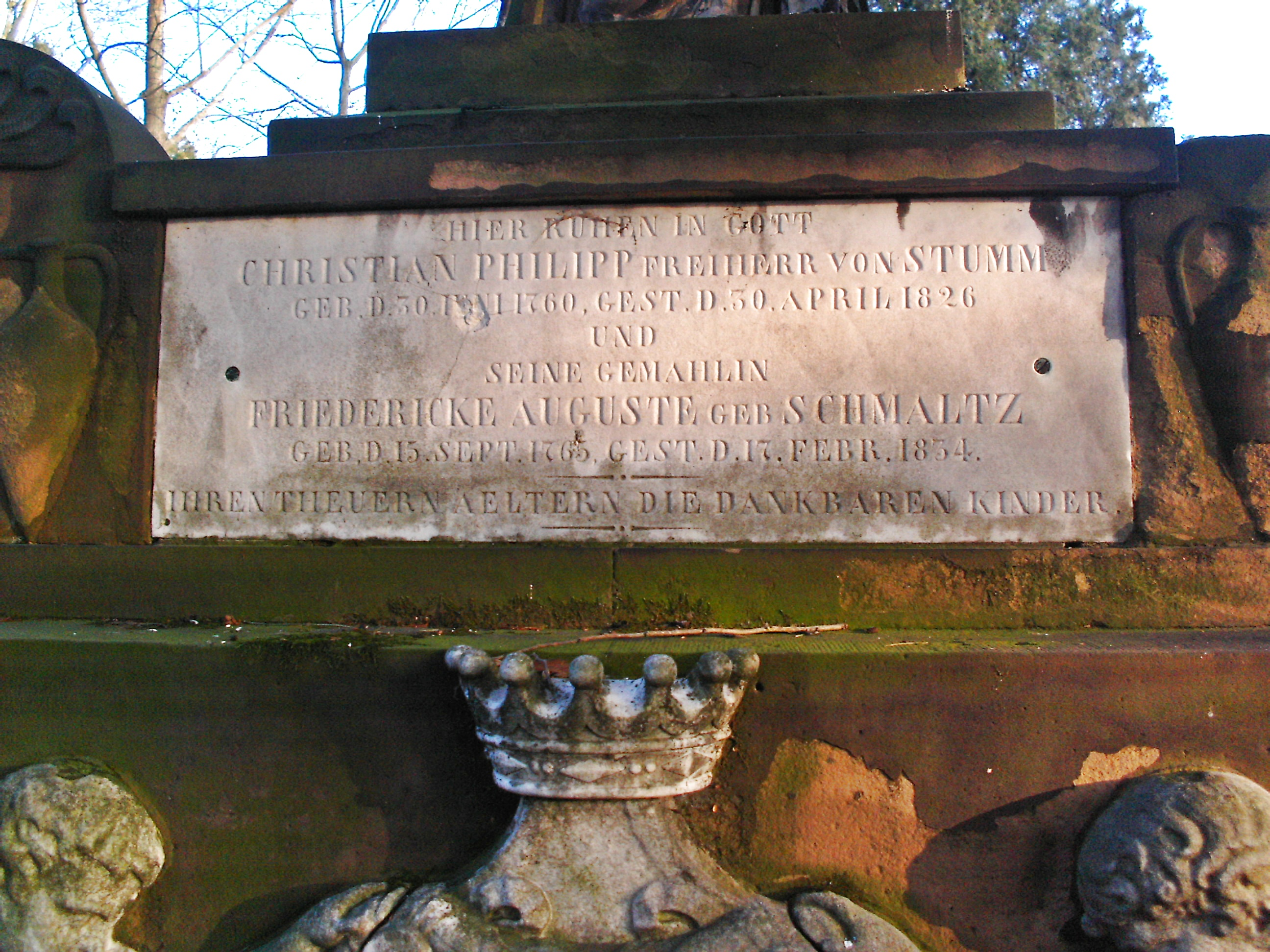 Hauptfriedhof Mannheim, Grabinschrift des Freiherrn Christian Philipp von Stumm (1760-1826) und seiner Ehefrau Friederike Auguste Schmalz. Sie war die Alleinerbin des gleichnamigen Mannheimer Handels- bzw. Bankhauses Schmalz. Dieses hatte quasi den Status einer kurpfälzischen Hausbank